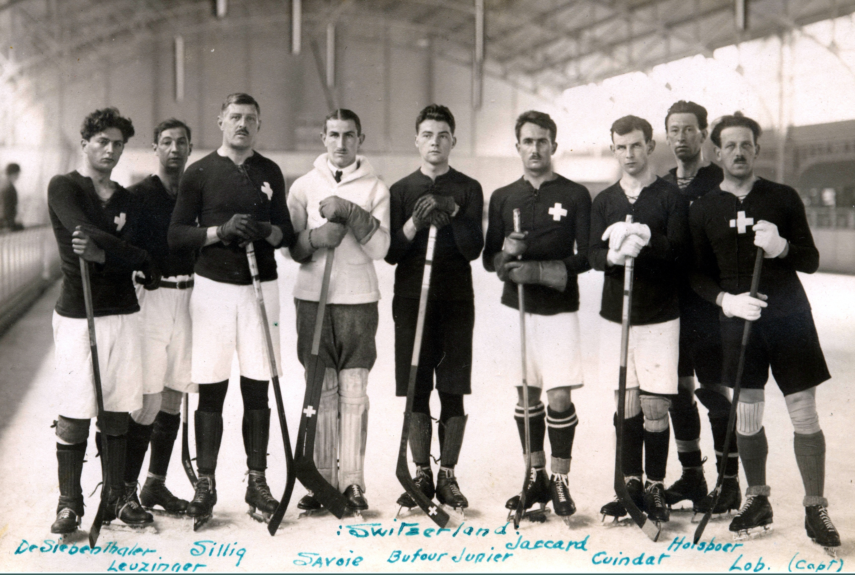 Schweizer Eishockey-Nationalmannschaft bei den Olympischen Spielen 1920